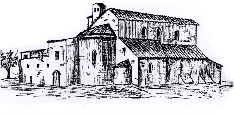 Disegno dell'abside della distrutta Abbazia di Spugna (Colle di Val d'Elsa)